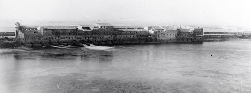 Ponte dei Mulini